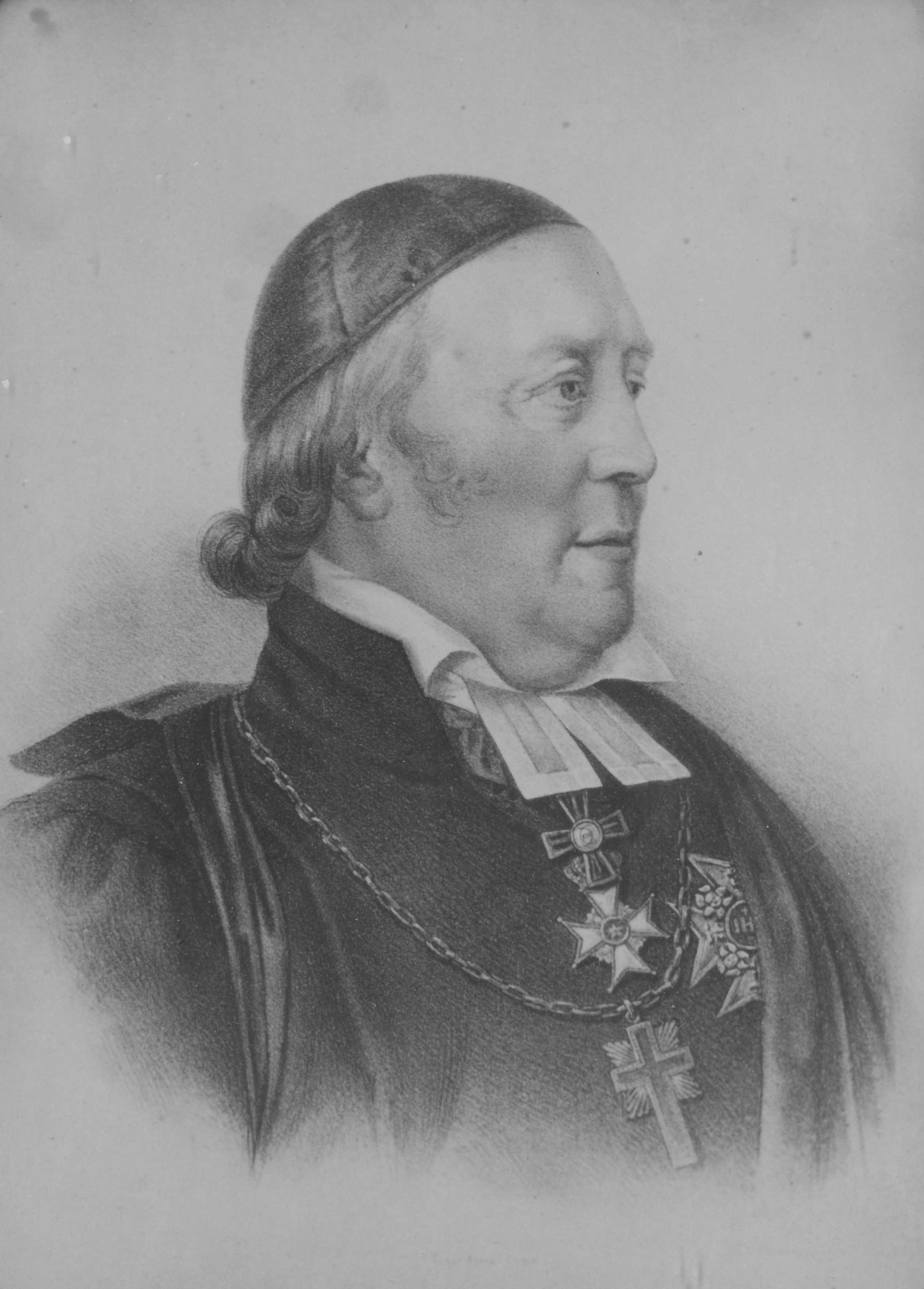 Carl von Rosenstein, 1834